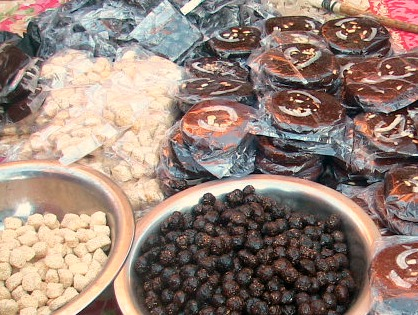 नेपाली: मैले आफैले खिचेको फोटो हो